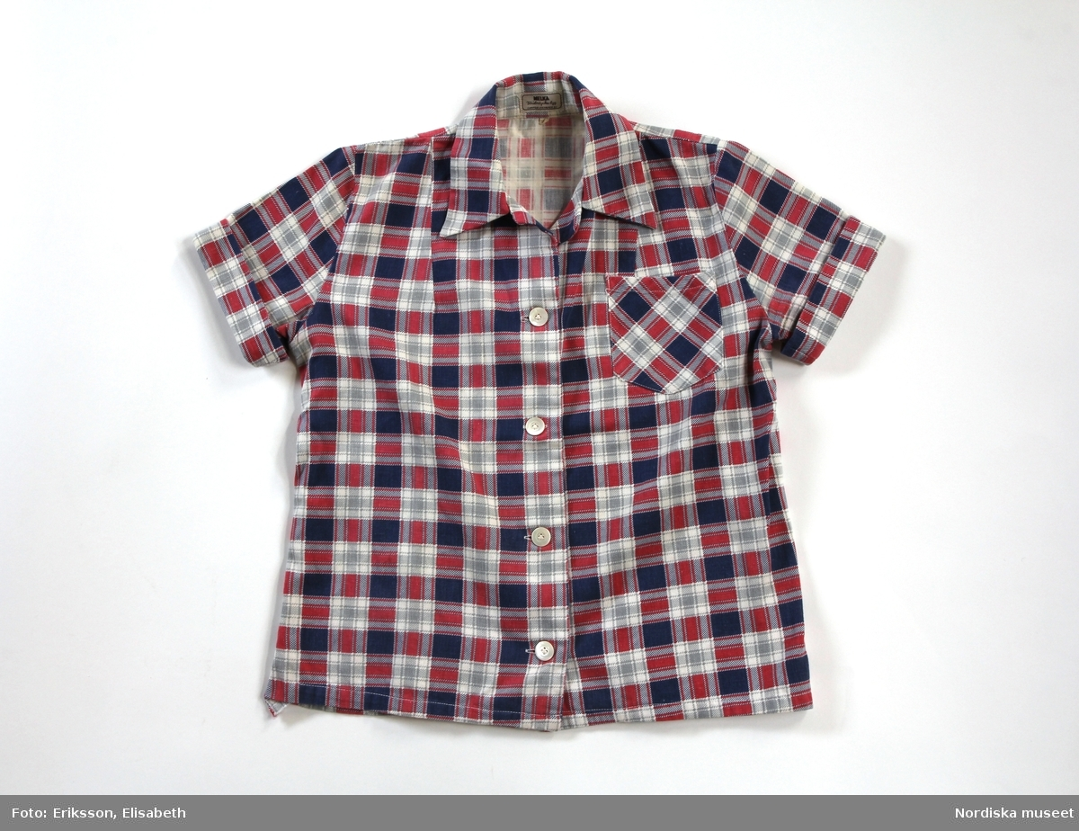 Blus för kvinna av diagonalkypertvävd bomull, rutig i blått, rött, vitt och grått. Ettt bakstycke och två framstycken. Knäpps mitt fram med fem isyydda pärlemorknappar och knapphål. Bystveck från axelsömmen. Krage med spetsiga snibbar påsydd. Kort isydd ärm med uppslag. Bröstficka, sprund nertill i sidosömmarna. Firmamärke på kragens insida: "Melka Mölnlycke tyg. Sanfor kryper ej".